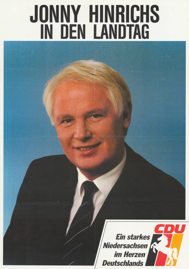 Jonny Hinrichs in den Landtag CDU Ein starkes Niedersachsen im Herzen Deutschlands Abbildung: Porträtfoto - Nationalfarben mit Niedersachsenross Plakatart: Kandidaten-/Personenplakat mit Porträt Objekt-Signatur: 10-008 : 730 Bestand: Landtagswahlplakate Niedersachsen (10-008) GliederungBestand10-18: Landtagswahlplakate Niedersachsen (10-008) » CDU Lizenz: KAS/ACDP 10-008 : 730 CC-BY-SA 3.0 DE